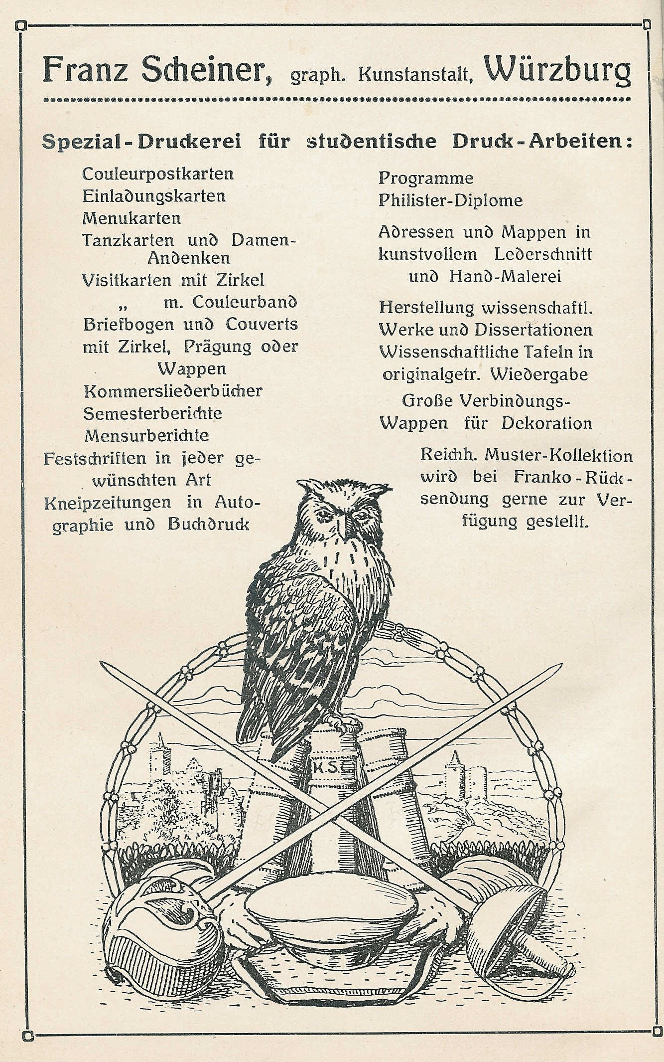 Werbeanzeige der Franz Scheiner Graphische Kunstanstalt, Würzburg